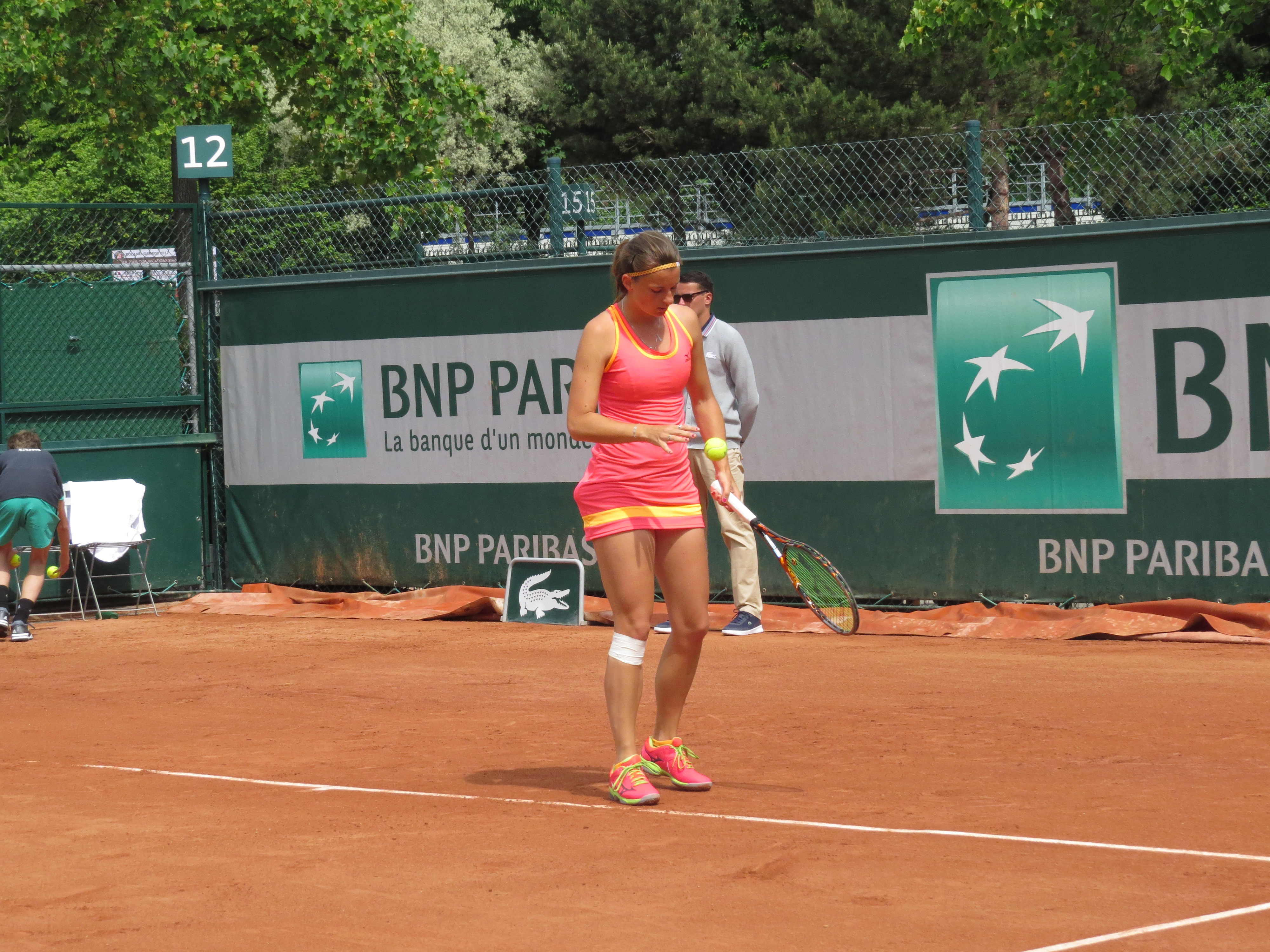 Quirine Lemoine lors de son premier tour des qualifications face à Lina Gjorcheska (court n°12)